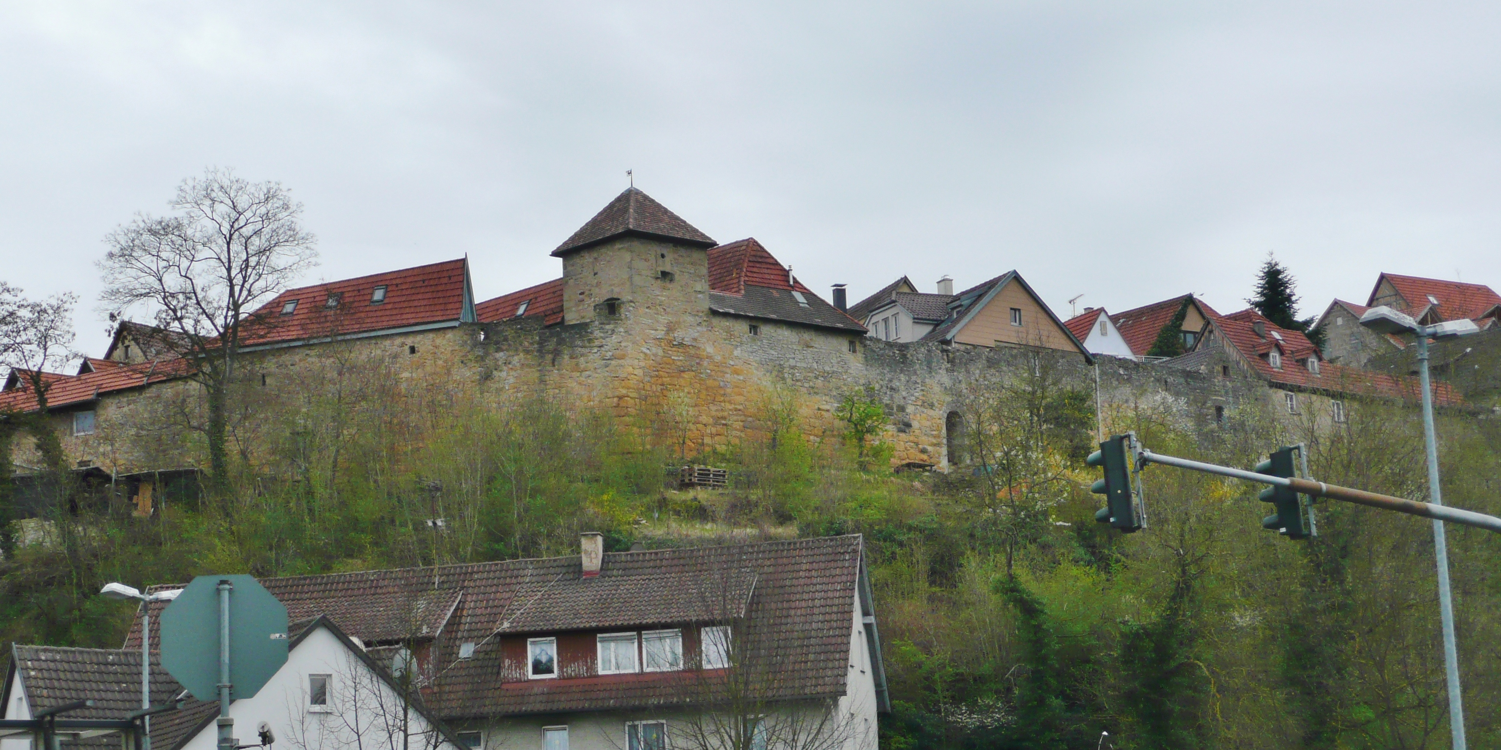 Marbach